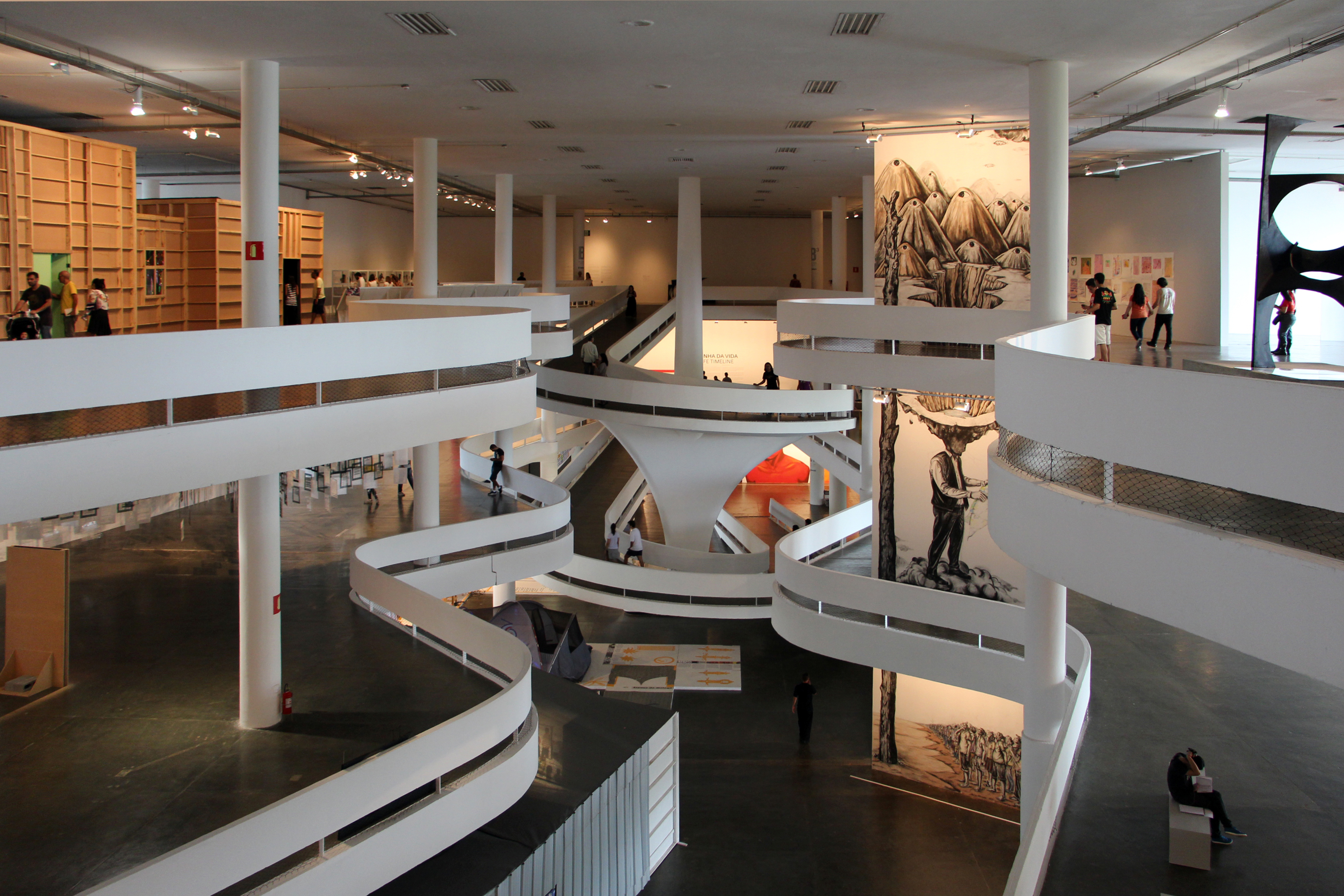 Ibirapuera San Paolo